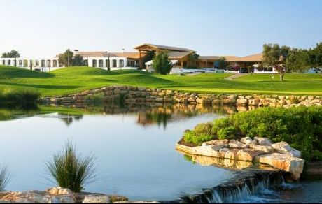 Golfbaan Oceanico Victoria in Portugal